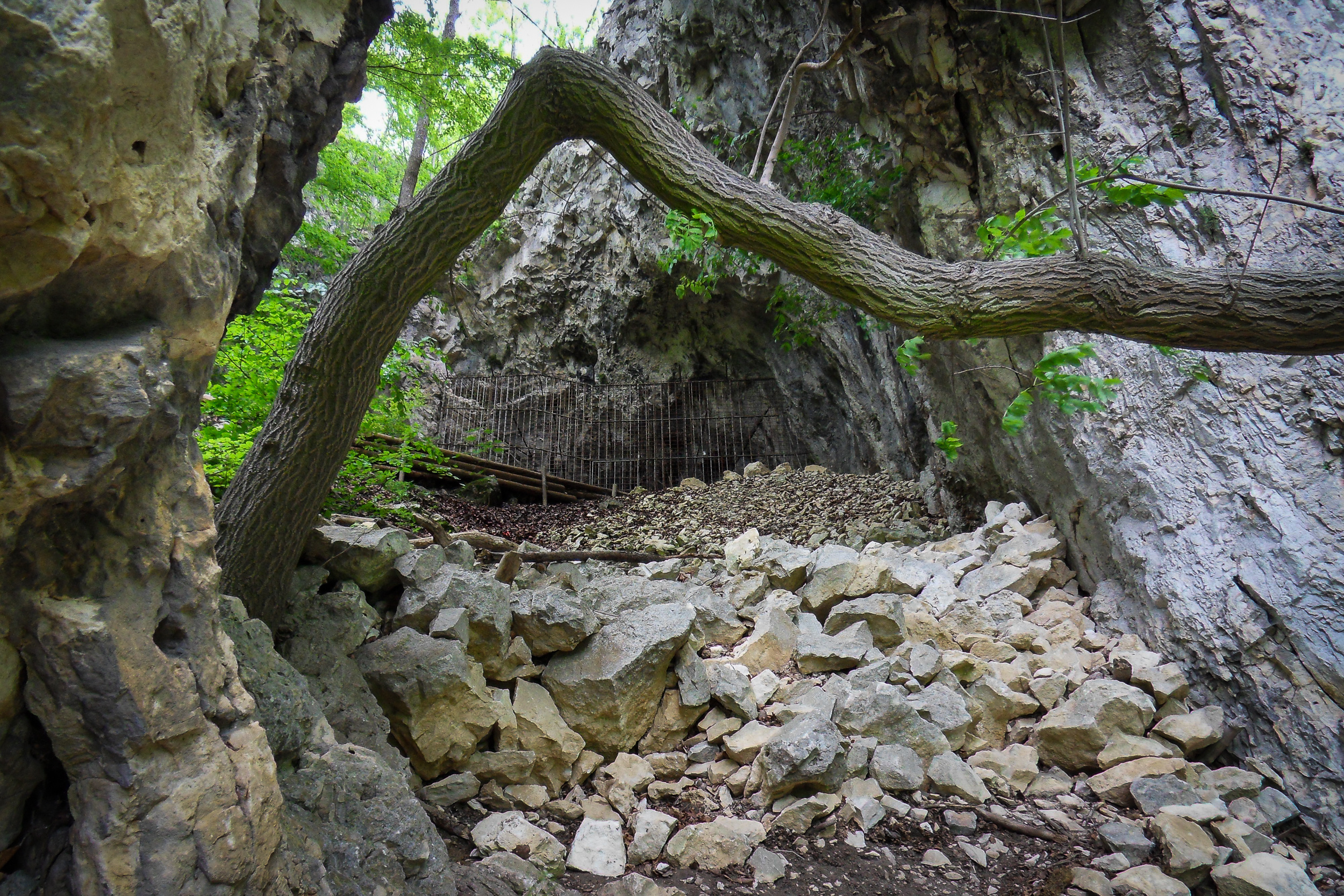 Der Abri Geißenklösterle im Achtal bei Blaubeuren, Baden-Württemberg, Deutschland.